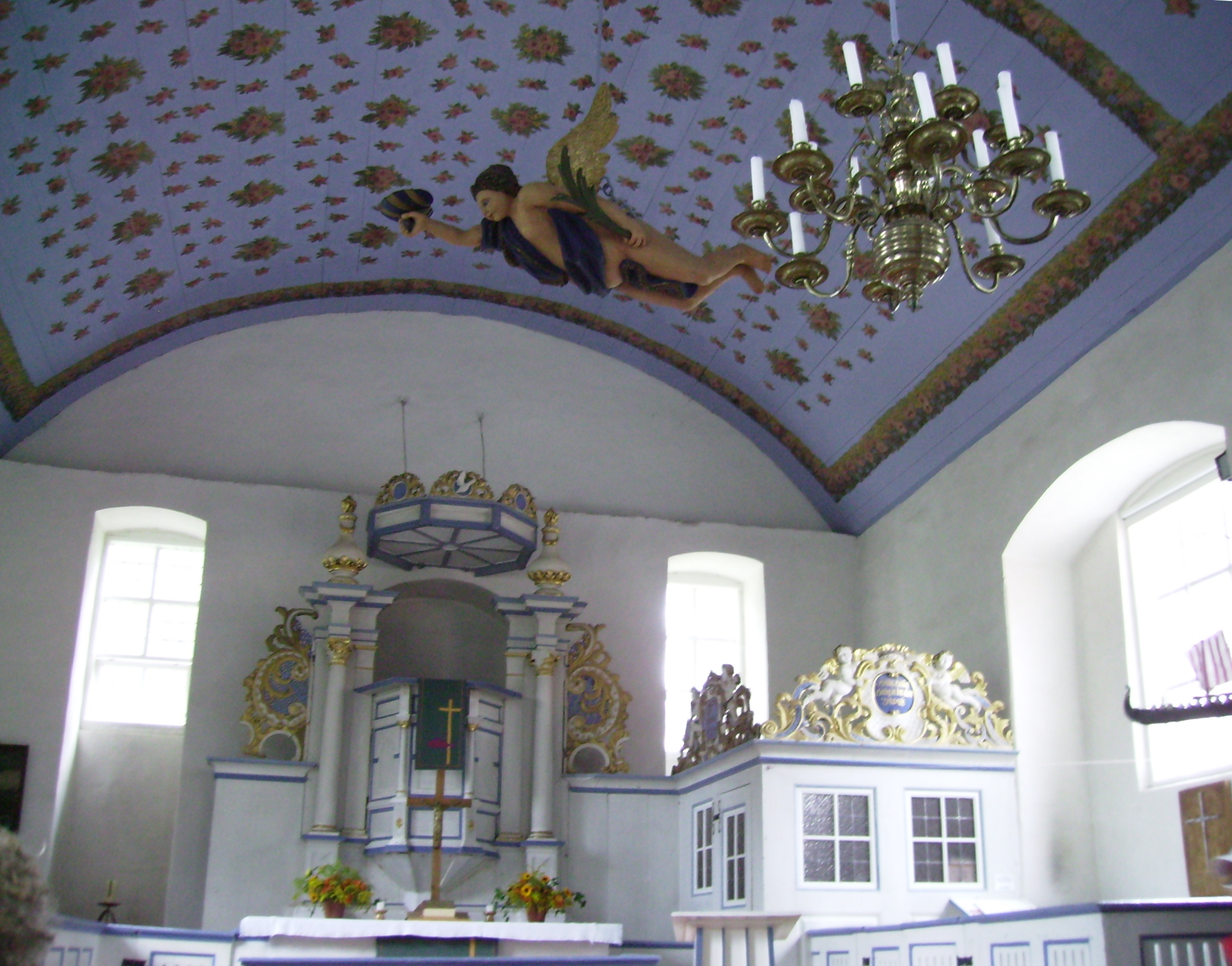 Inneres der Kirche in Kloster auf Hiddensee